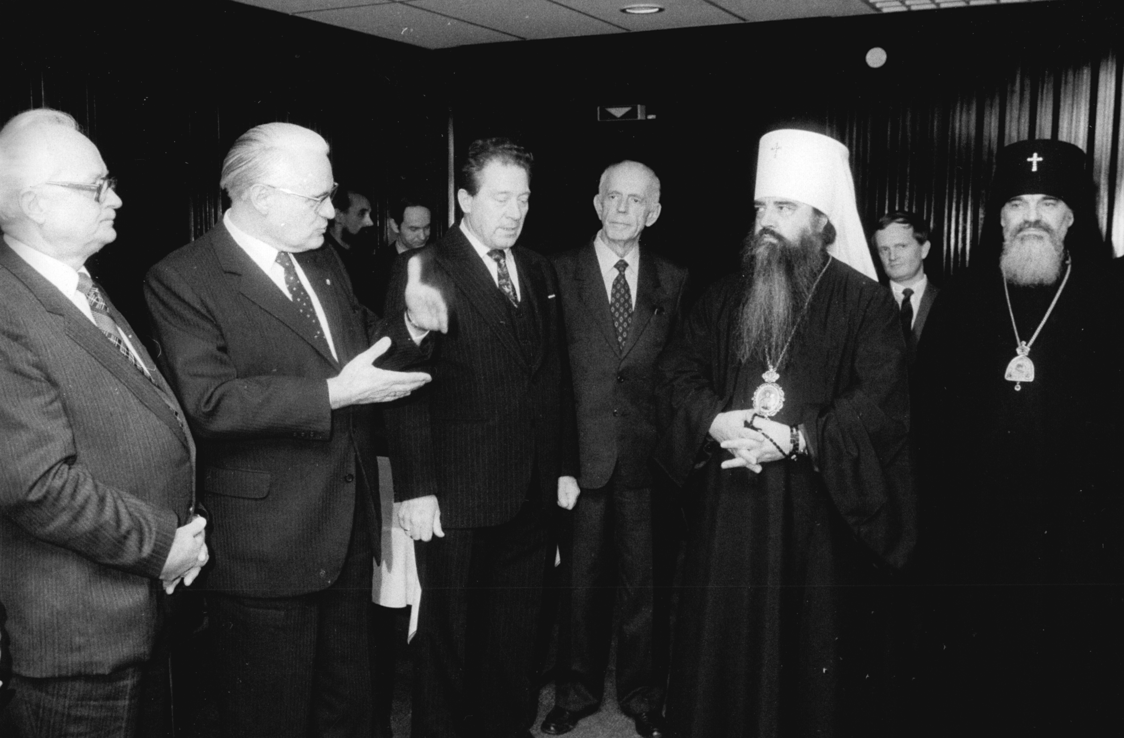 ADN-ZB Zimmermann-18.3.85-me.-Berlin: Präsidium des CDU-Hauptvorstandes würdigte 40. Jahrestag des Sieges über den Hitlerfaschismus - Dem 40. Jahrestag des Sieges über den Hitlerfaschismus und der Befreiung des deutschen Volkes war in Berlin eine Tagung des Präsidiums des Hauptvorstandes der CDU gewidmet. Daran nahmen zahlreiche christliche Persönlichkeiten aus sozialistischen Ländern teil. v.l.: Zenon Komender, Vorsitzender der Vereinigung PAX (Polen), Gerald Götting, Vorsitzender der CDU. Rechts: Erzbischof Feodosi und 2.v.r.: Metropolit Philaret, Leiter des Außenamtes der Russischen Orthodoxen Kirche (Moskau).